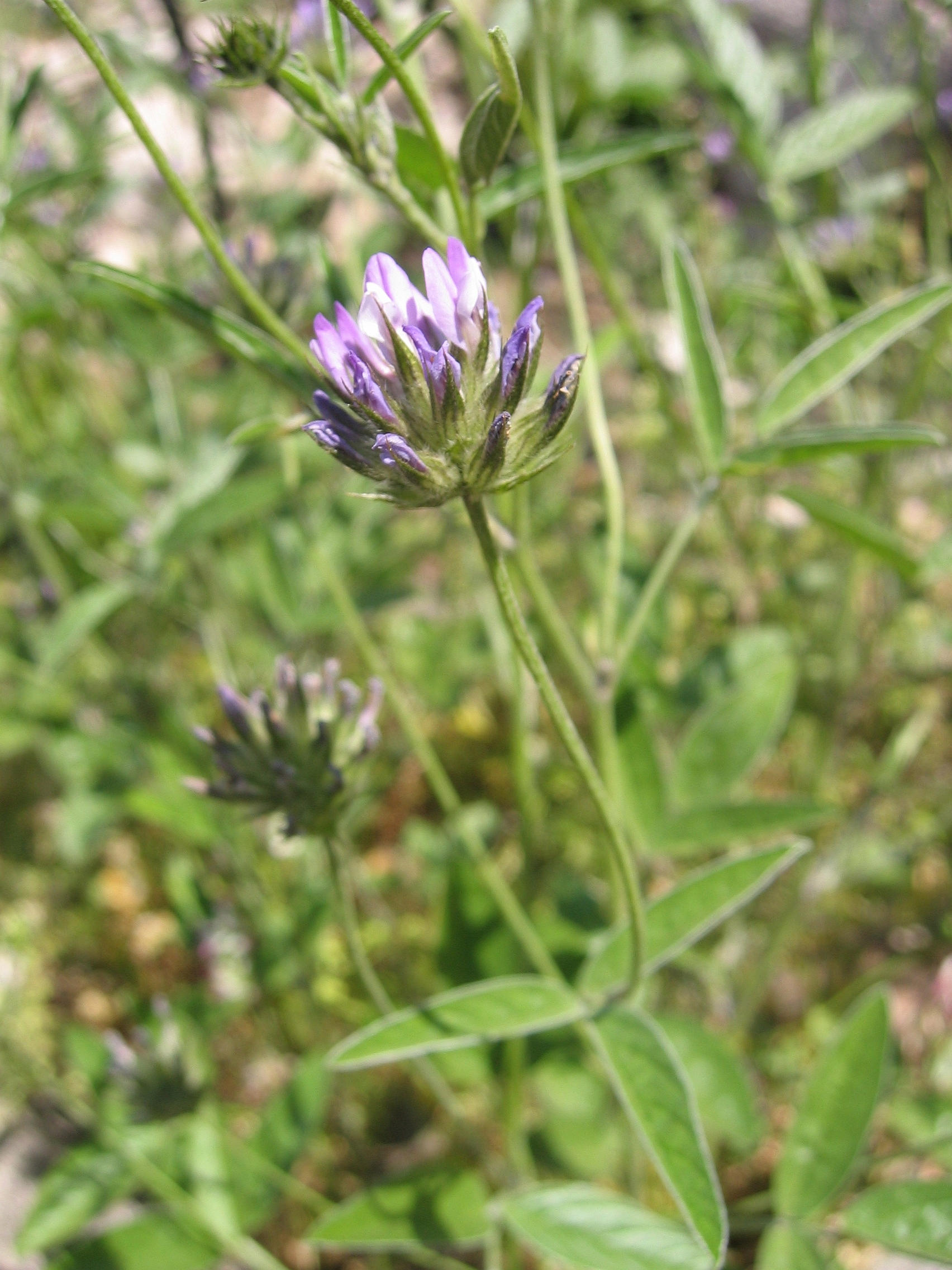 Bituminaria bituminosa Calvi, Corse, France